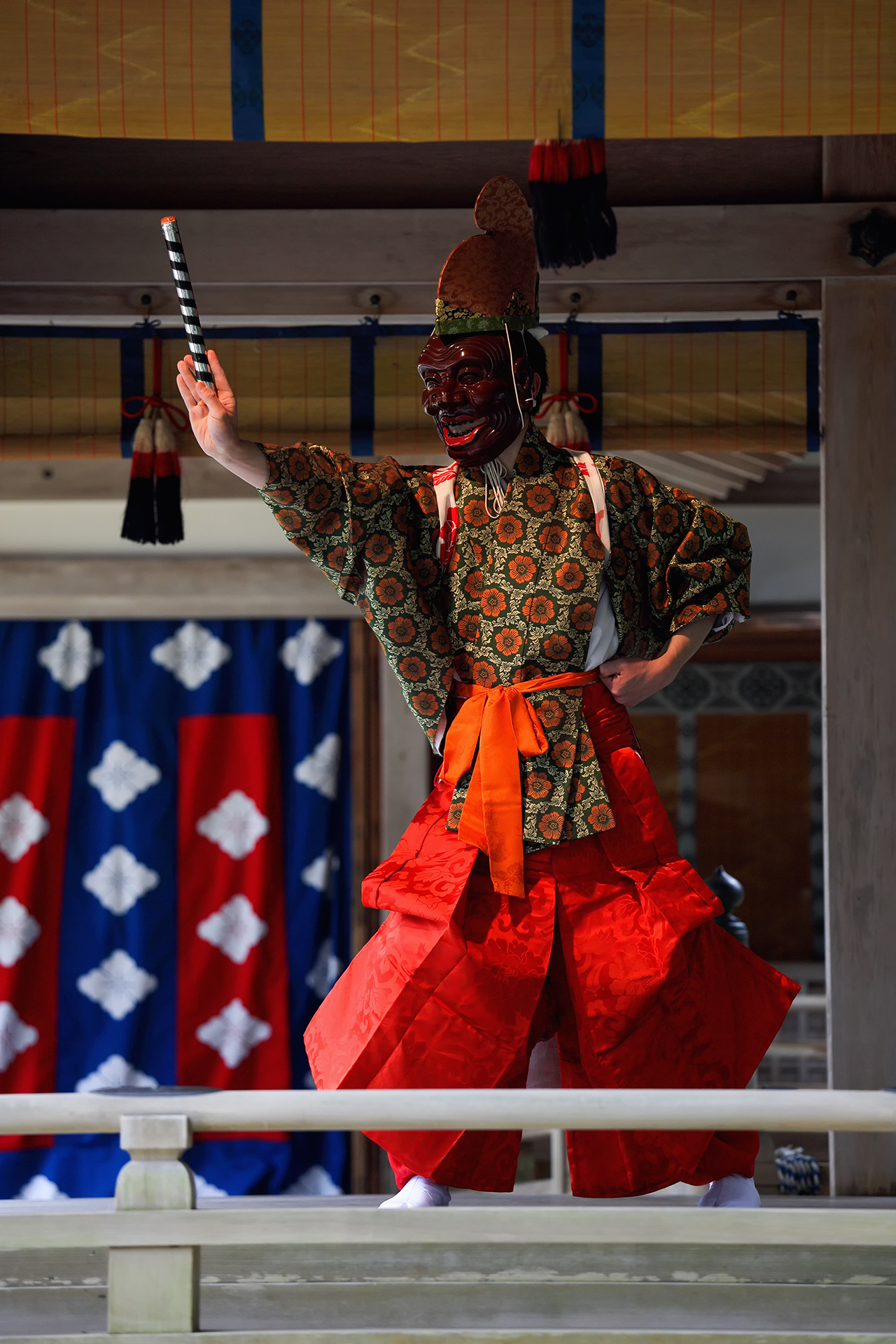 越後一宮彌彦神社の妻戸大神例祭（妃神例祭）に舞殿で奏される、舞楽「大々神楽」の「二の舞」（大人面舞一人）。国重要無形民俗文化財に指定されている。